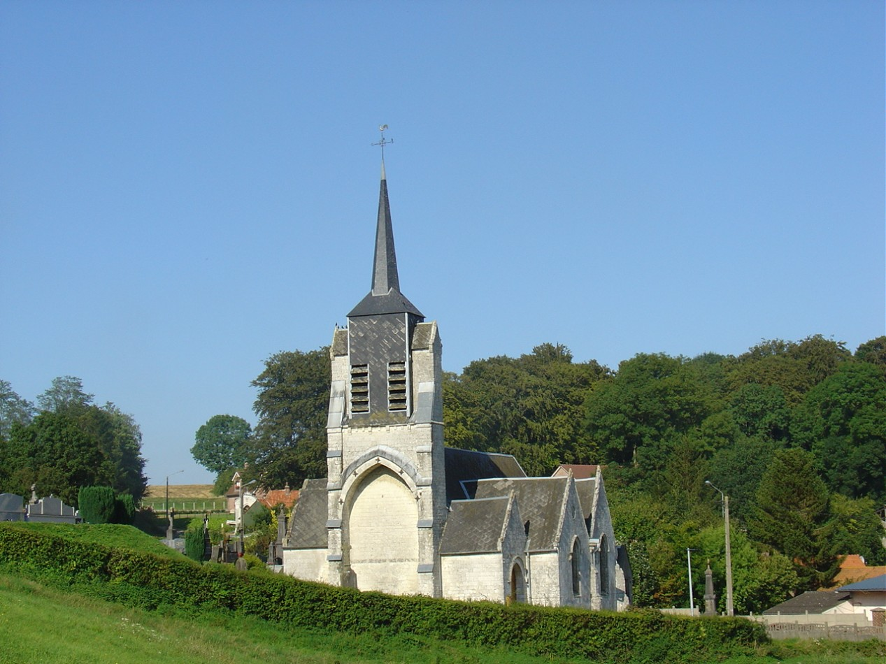 Église de Roëllecourt